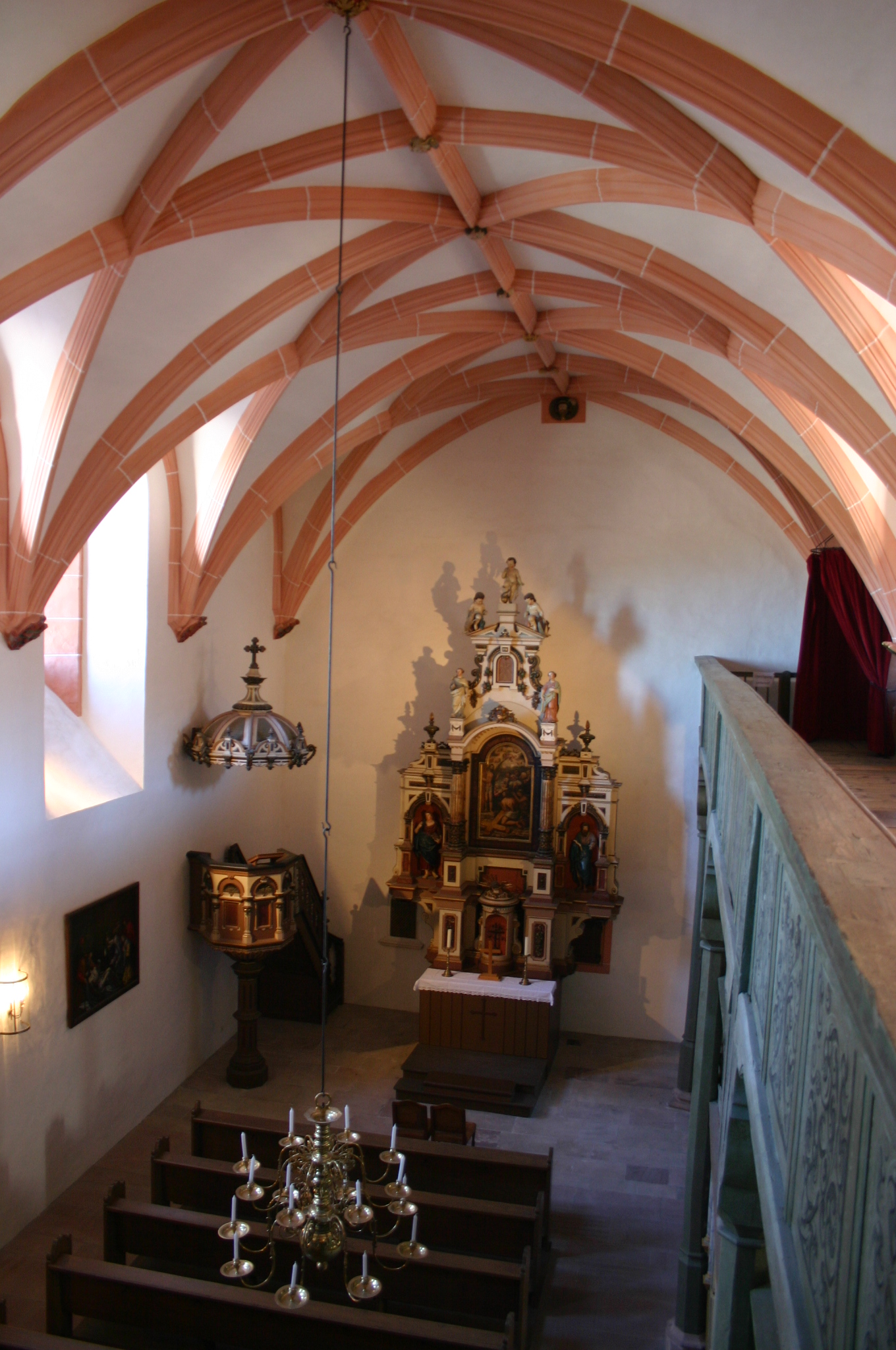 Blick von der Empore in die Burgkapelle der Plassenburg